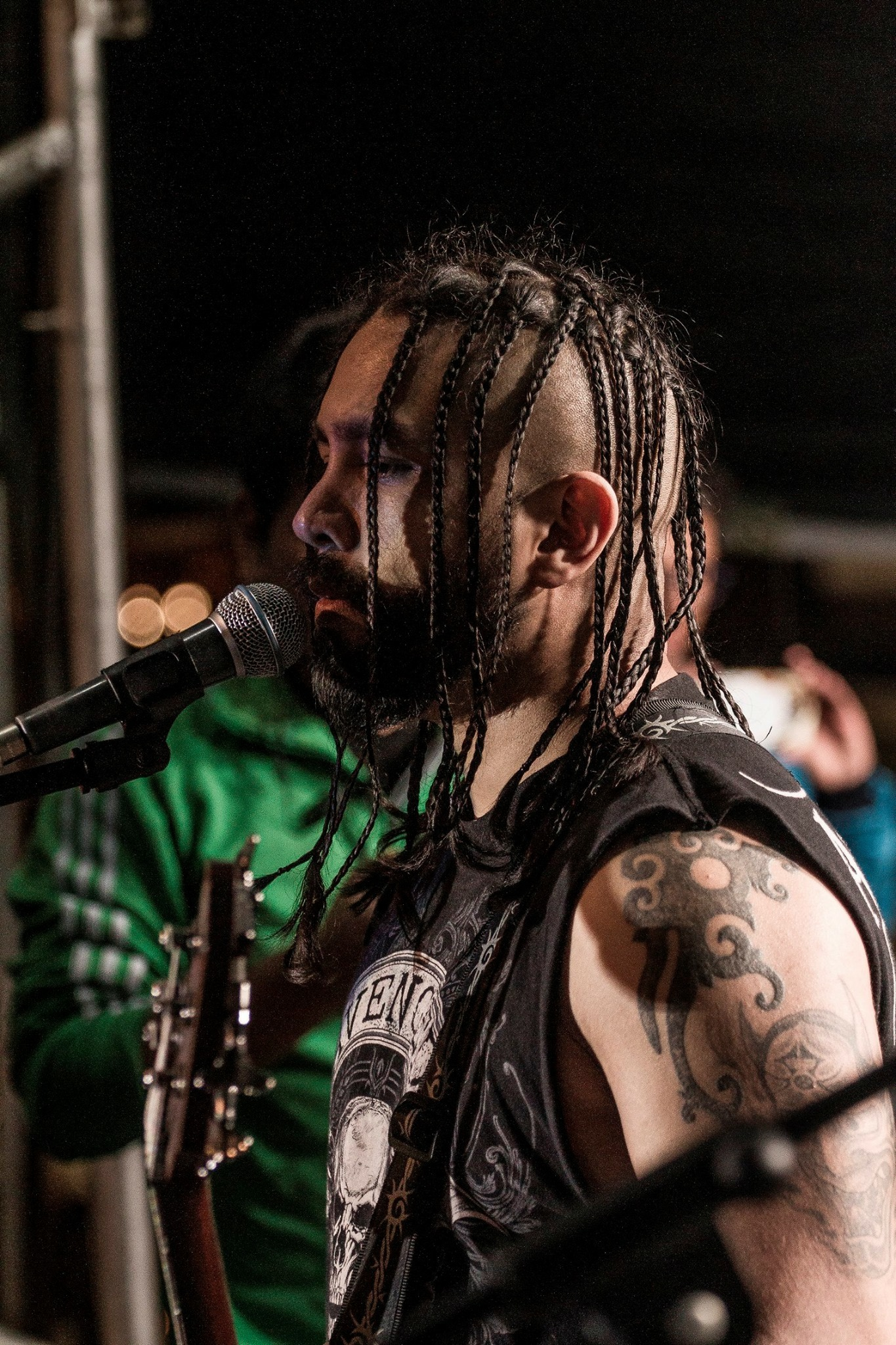 Vito Paredes tocando con Alcoholika en el ChukutaFest de Mi Teleférico el16 de julio de 2016